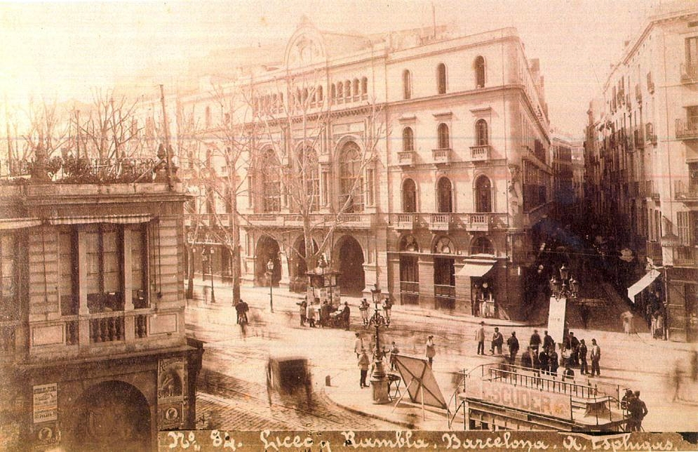 Teatre del Liceu a Barcelona (Espanya).